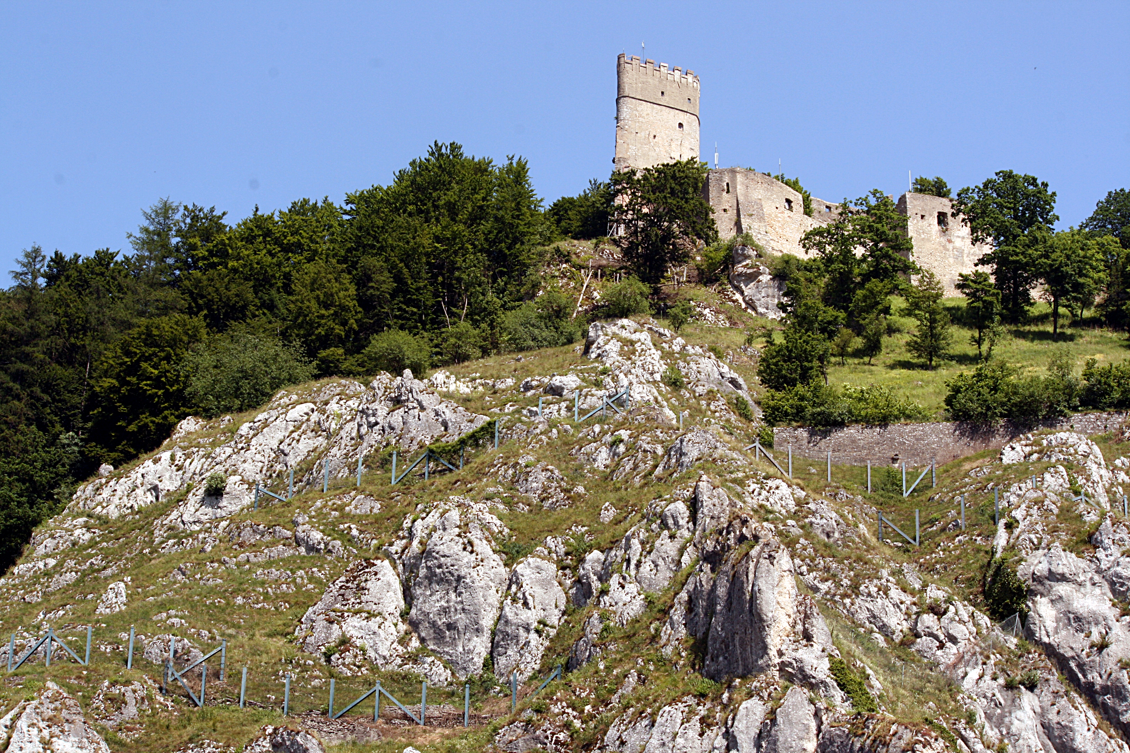 Burg_Randeck_über der Ortschaft Essing im Landkreis_Kelheim